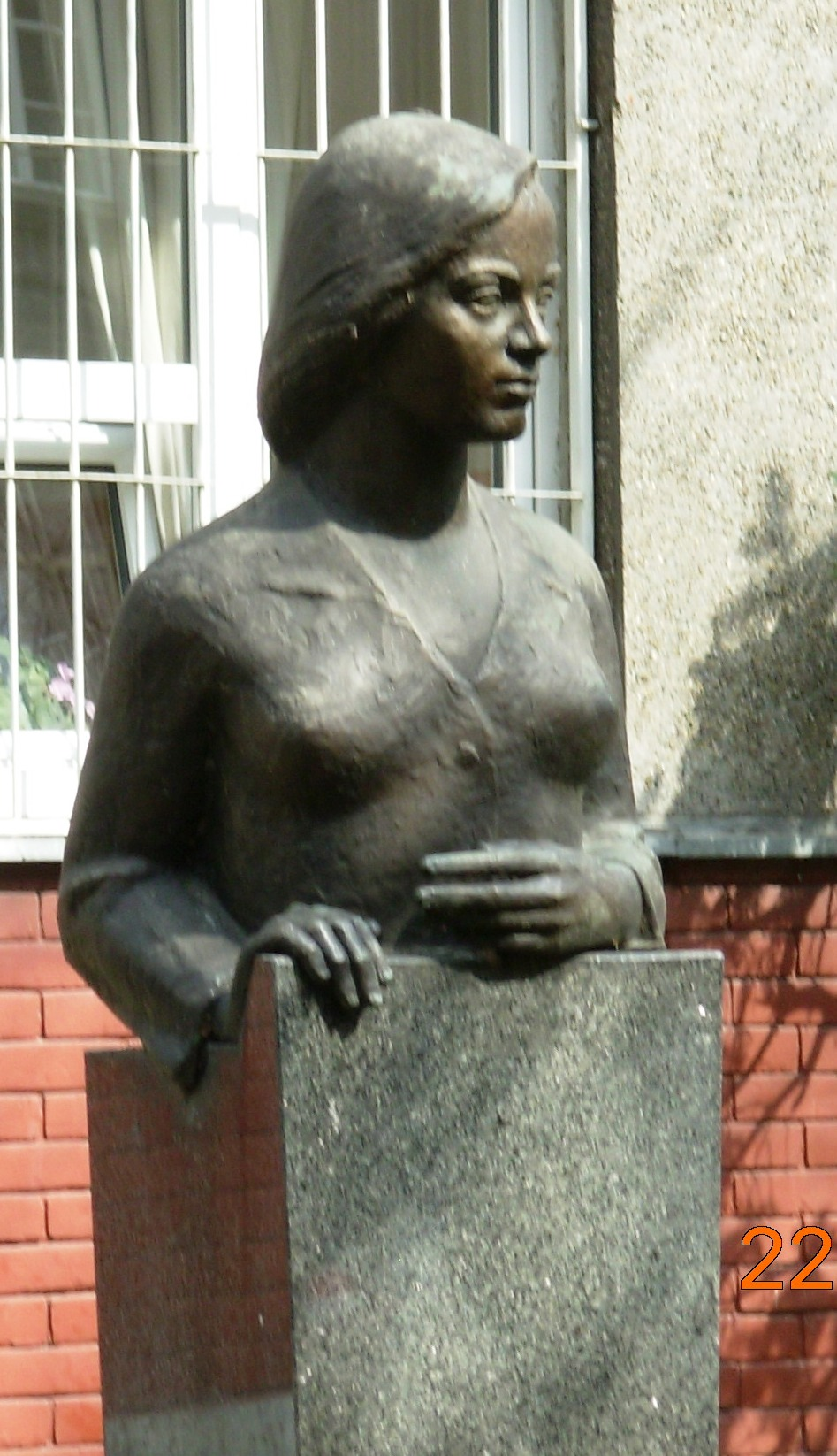 Bista Drinke Pavlović ispred istoimene škole u Kosovkoj ulici u Beogradu, slikao Goldfinger